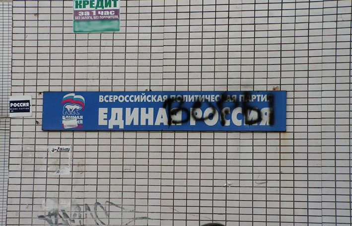 Проходил мимо одного из отделений партии "Единая Россия" в нашем городе, через три дня пришёл с фотоаппаратом, надпись всё ещё была. Видимо решили сменить название партии.